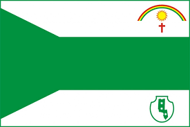 Bandera Bodocó